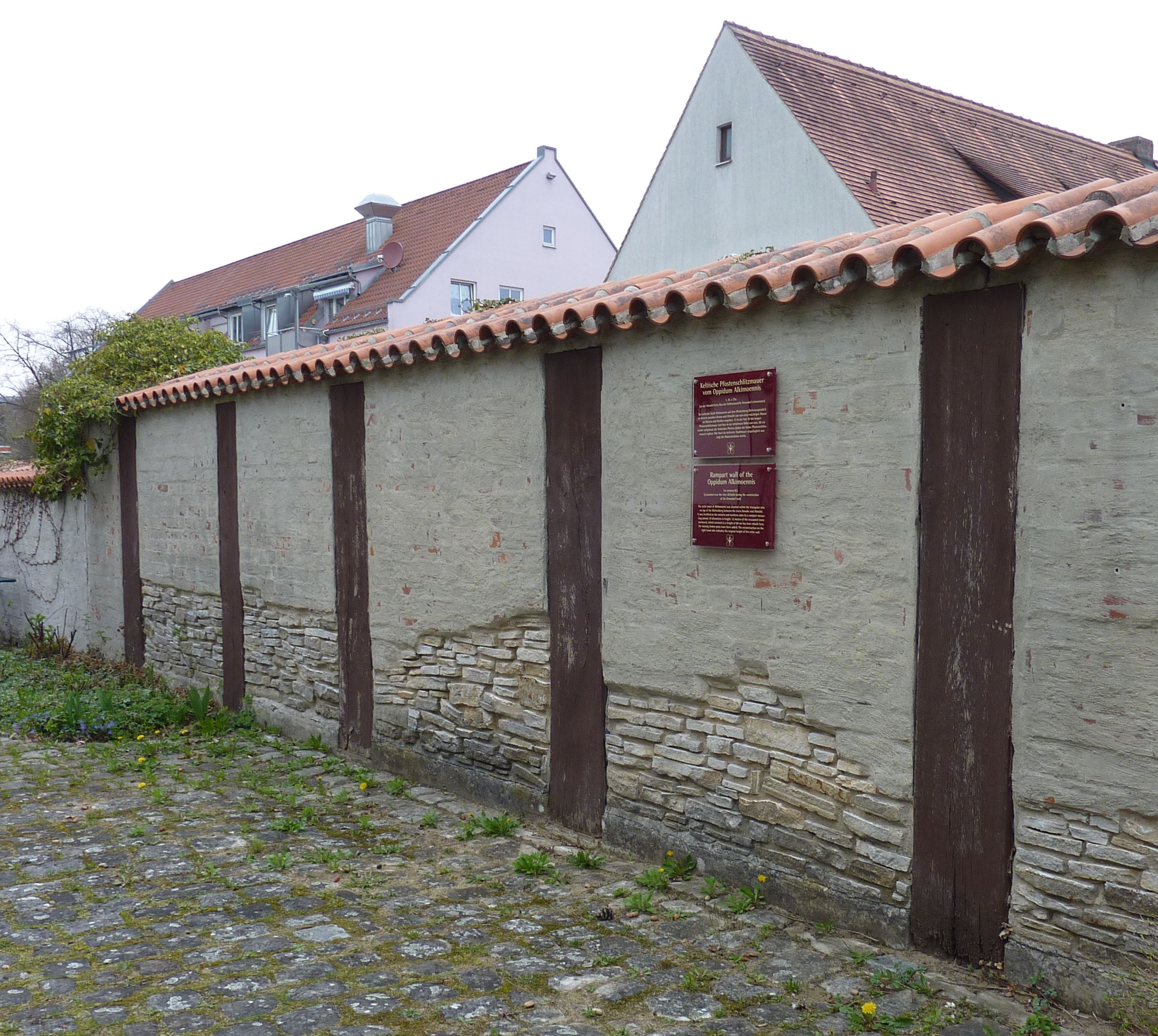 Pfostenschlitzmauer vom Oppidum Alkimoennis